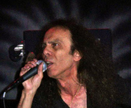 Ronnie Dio at IronFest, 2005